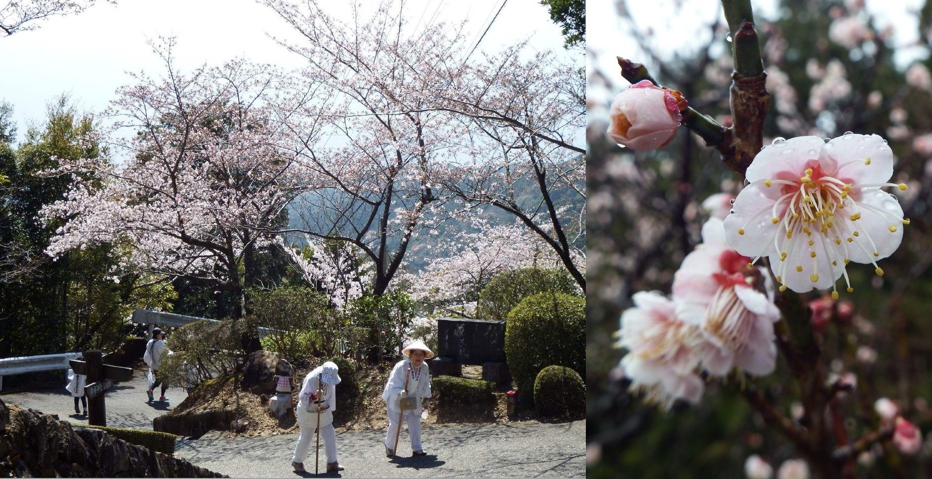 神峯寺の参道に咲く瓢箪桜